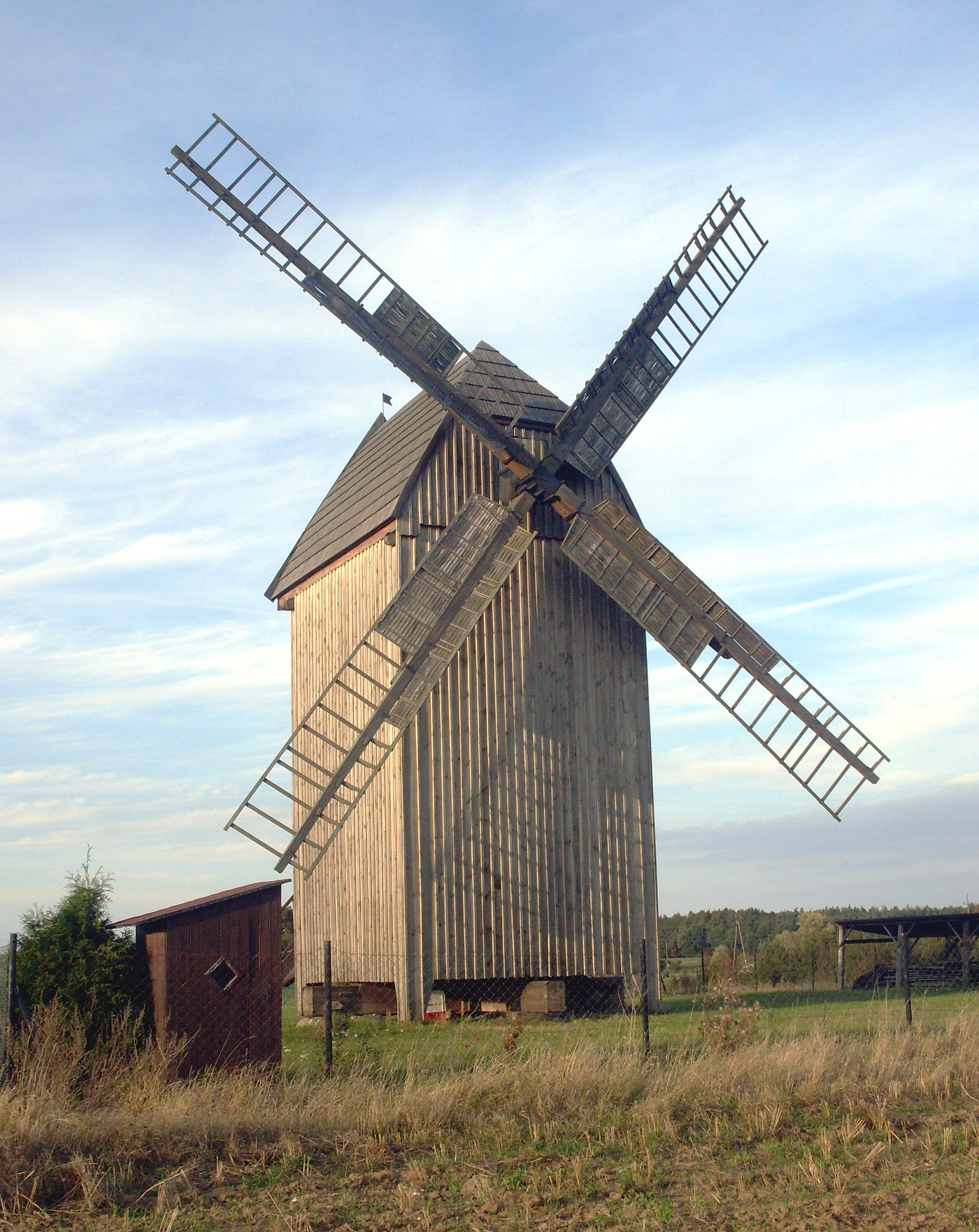 wiatrak koźlak Ostrowo, Gmina Strzelno